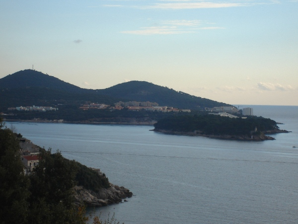 Babin Kuk